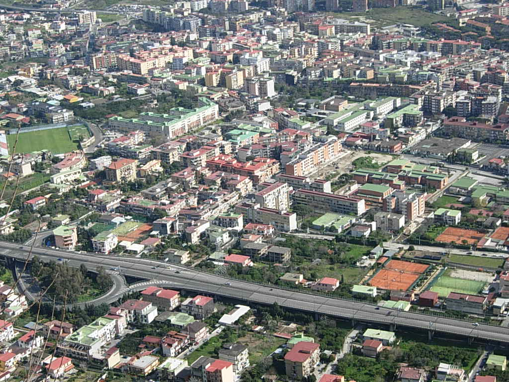 Veduta del quartiere Soccavo in Napoli Foto personale